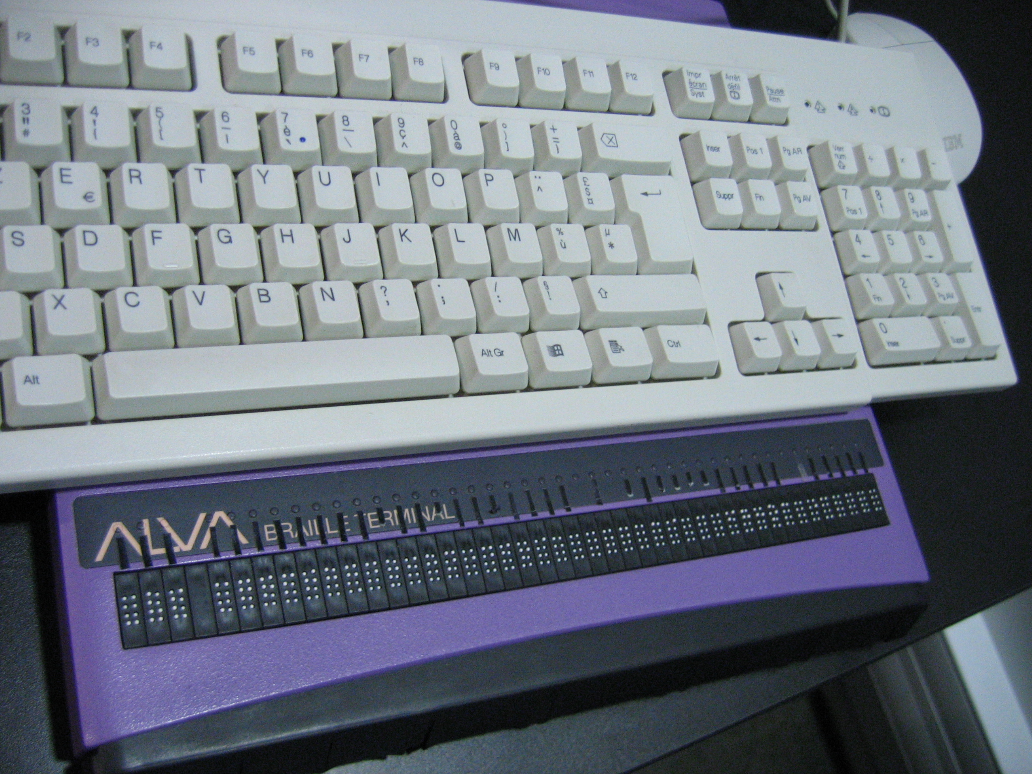 Description: plage braille (de marque Alva) Source: Photographie prise par Matthieu Faure Date: 15 décembre 2005 Author: Matthieu Faure Permission: double licence GFDL-self et CC-BY-SA